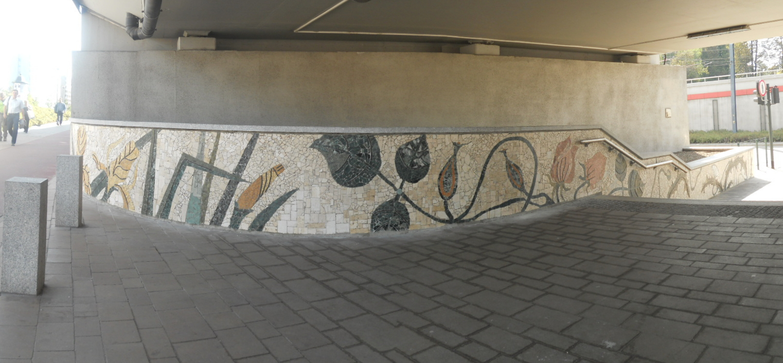 Mozaika "Wyspiański na Rondzie Mogilskim" w Krakowie wykonana we wrześniu 2012. Projekt: Lubosz Karwat.